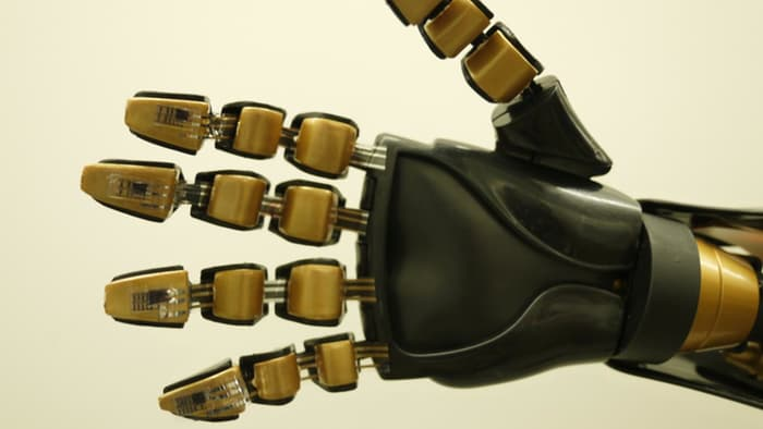 Роботизирана ръка с добавени сензори на пръстите, чувствителни на допир